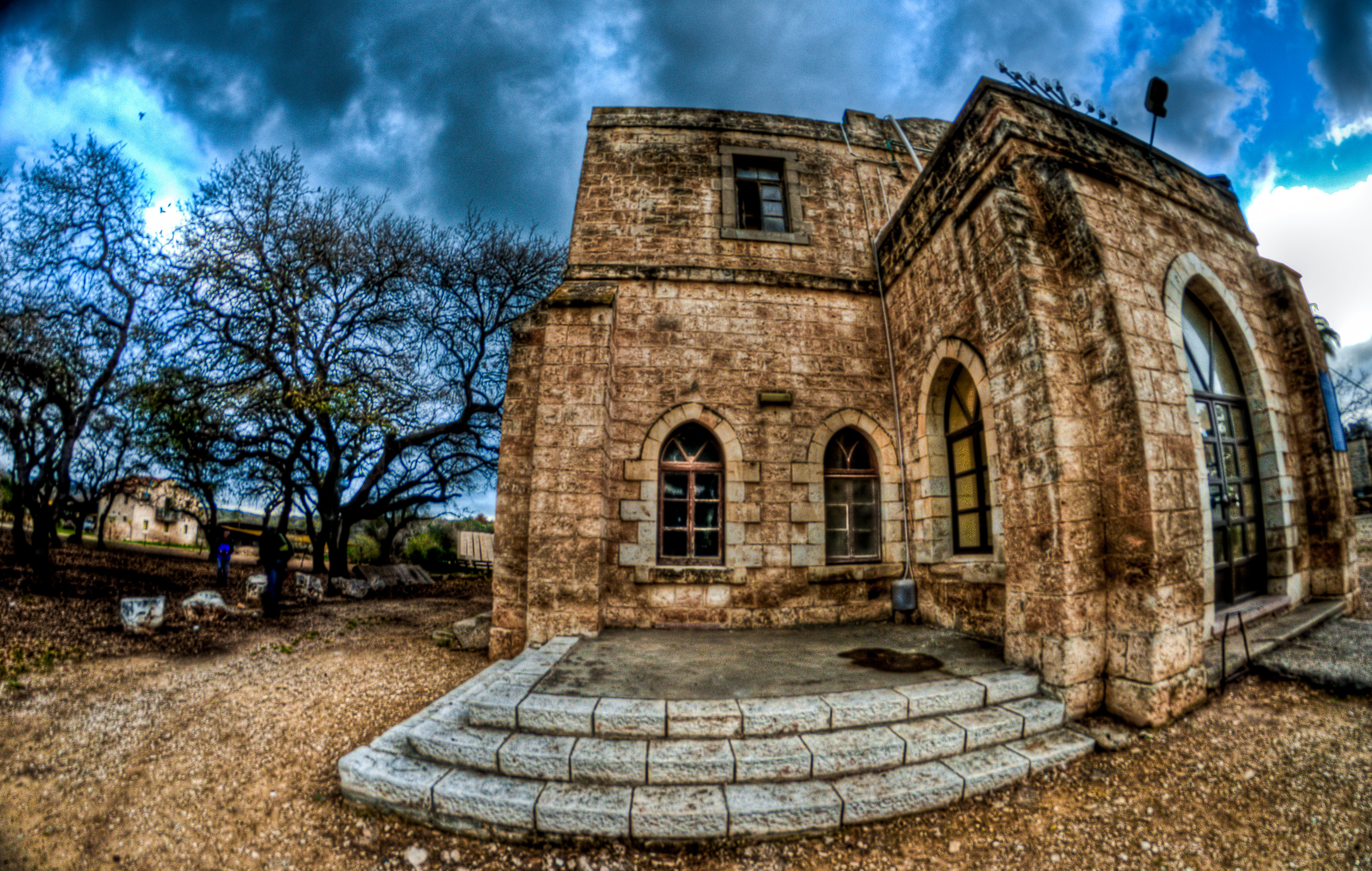 היישוב המודרני הראשון באיזור בית לחם הגלילית הוקם על ידי הטמפלרים ב-1906.